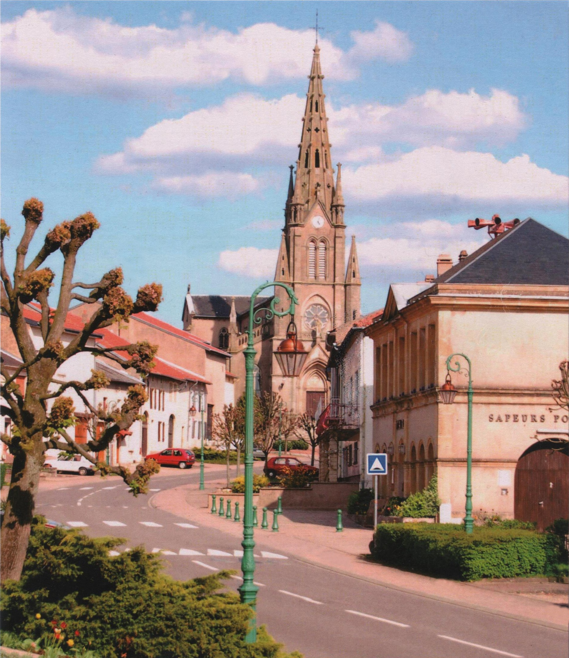 Le petit vilage de coume